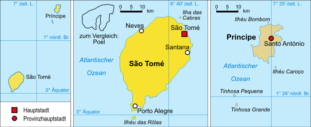 politische Karte von Sao Tome und Principe